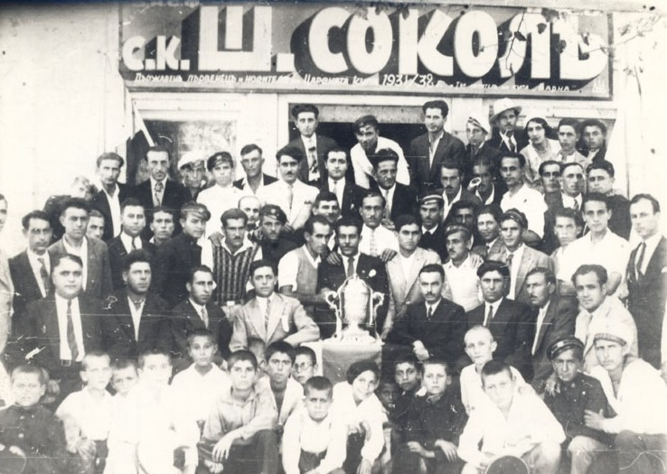 Спортен клуб Шипченски Сокол. Групов портрет на спортистите и членовете на клуба - първи носител на купа "Варна".